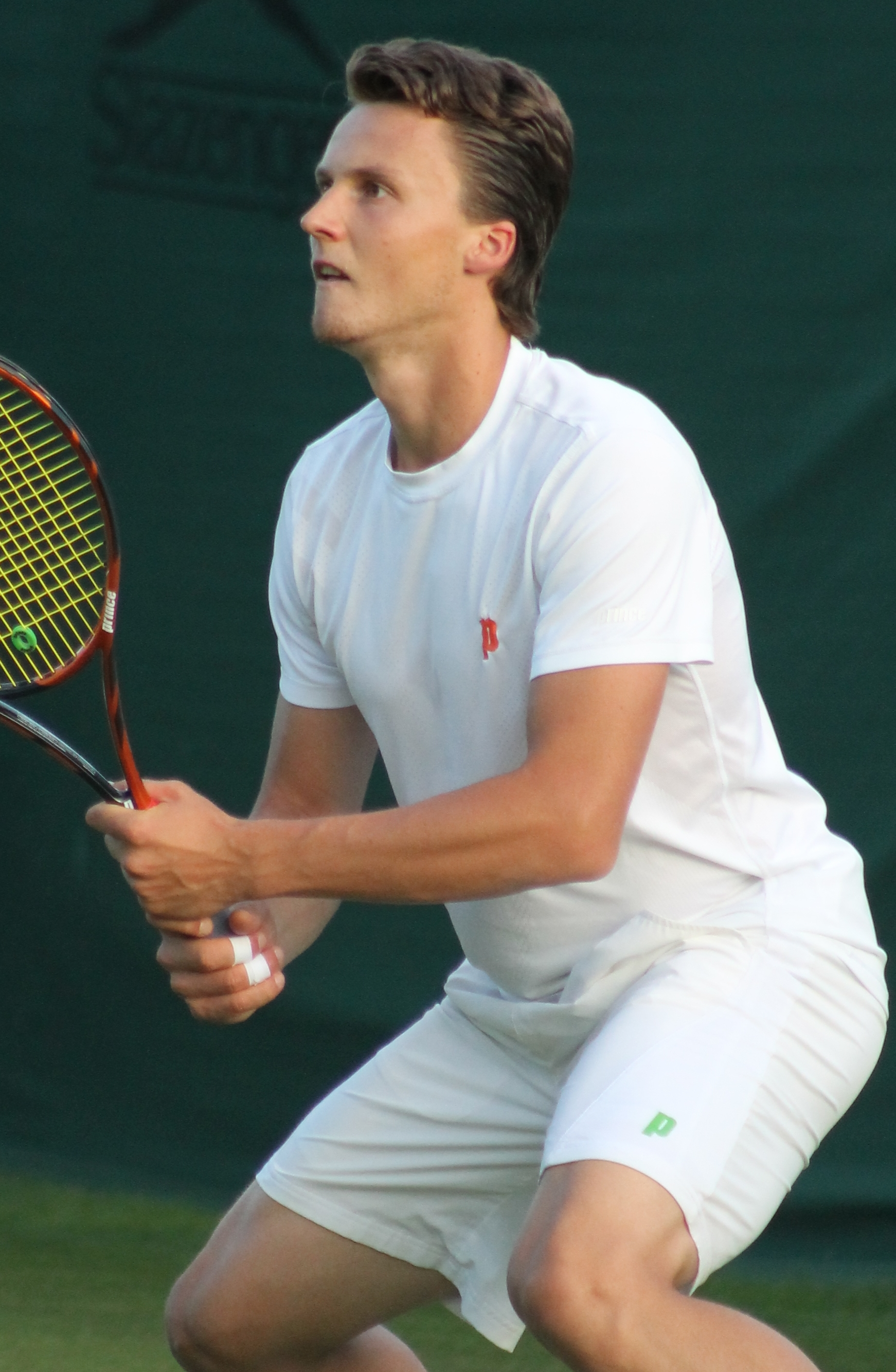 Kovalik WMQ15 (4)